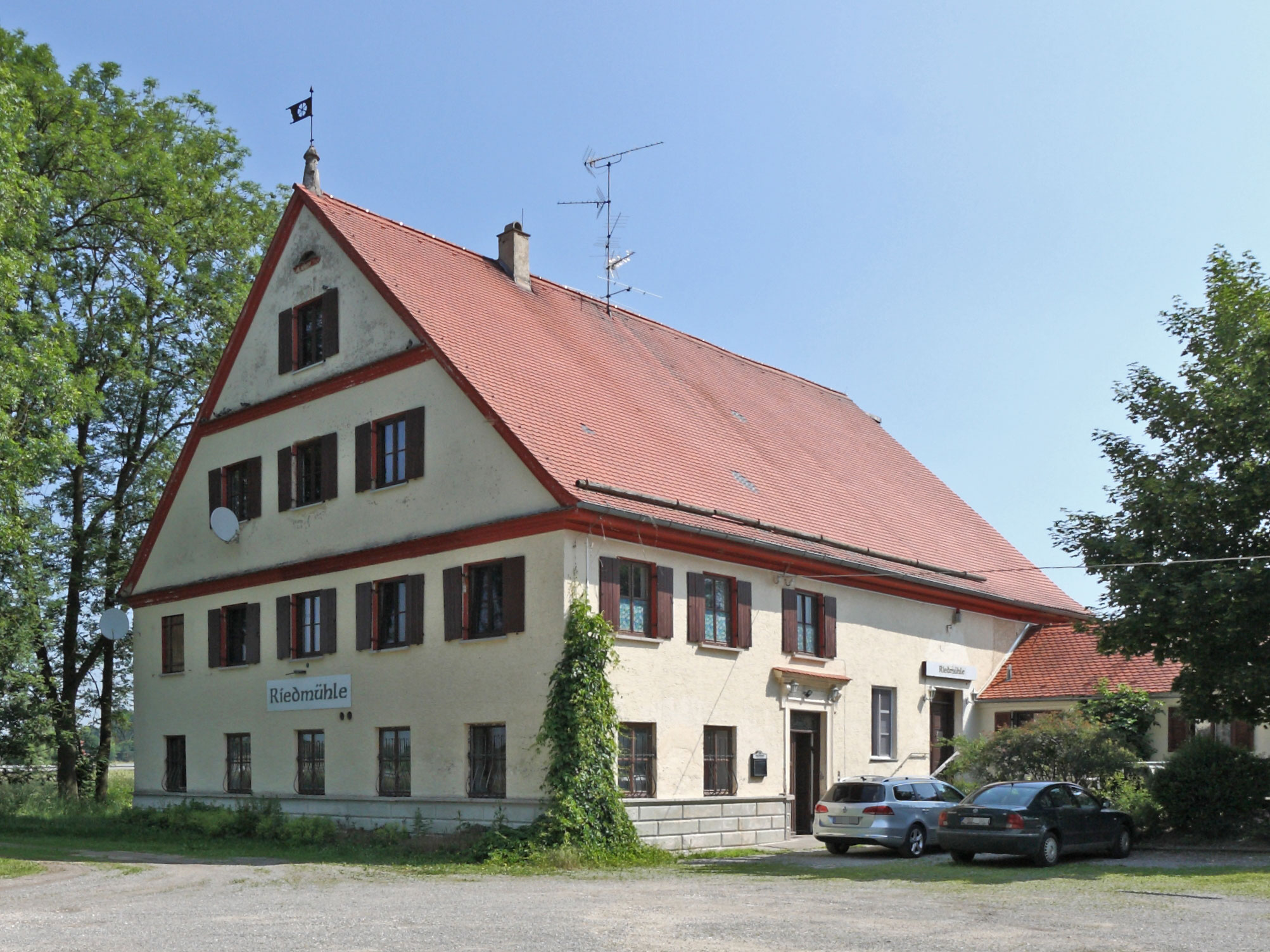 Riedmühle, Gemeinde Ellzee; Wohnhaus der ehemaligen Mahl- und Sägemühle, im Kern 18. Jh.